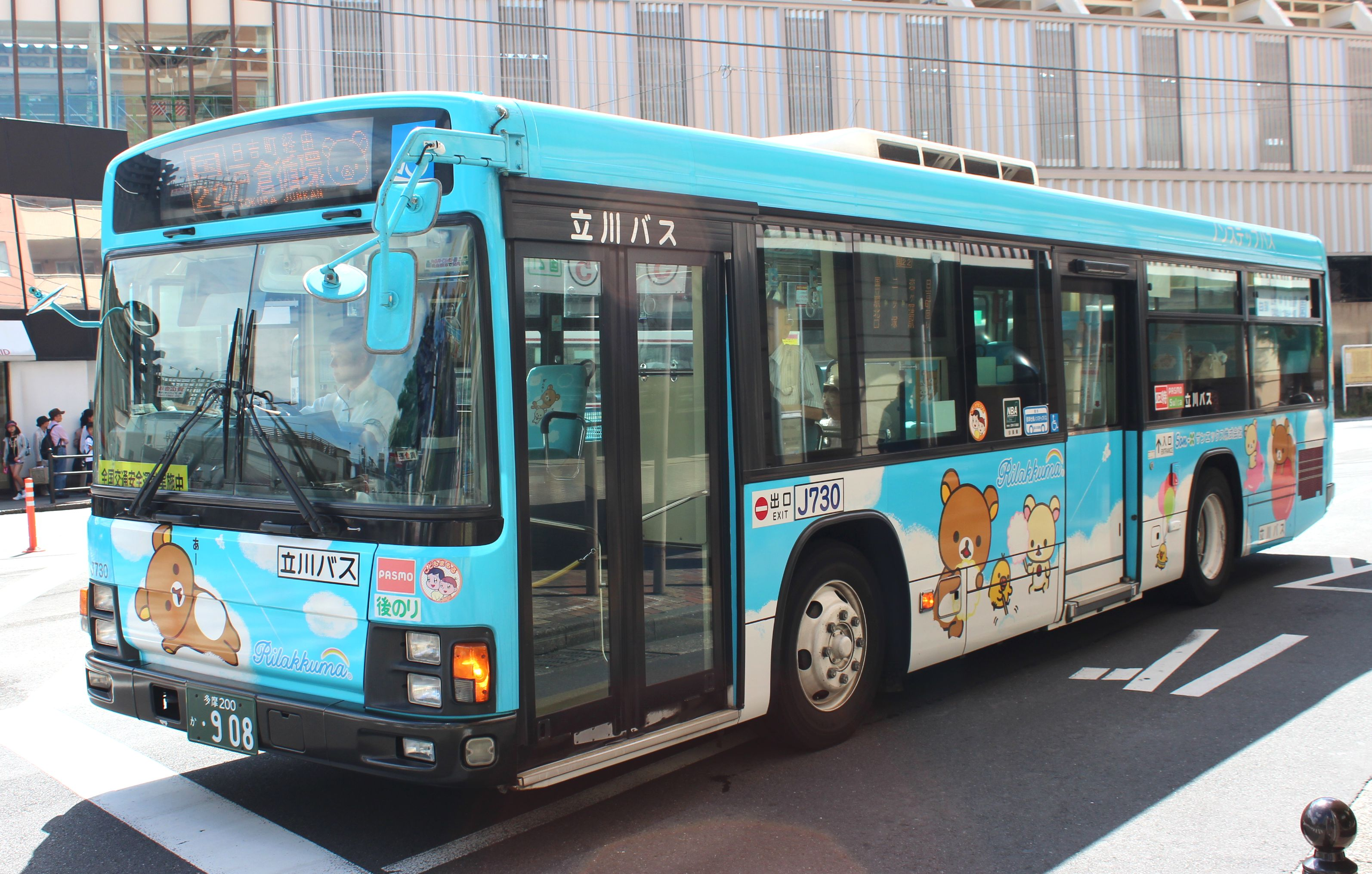 立川バス『リラックマ』デザイン車両